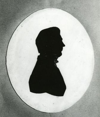 Martinus Manger Cats (1817-1896), burgemeester van Smallingerland